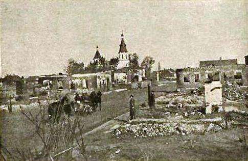 Беларуская (тарашкевіца): Маладэчна (Maładečna), вуліца Замкавая (vulica Zamkavaja). Царква-мураўёўка